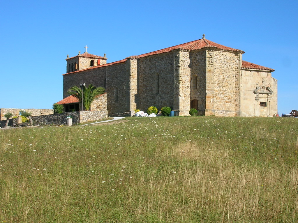 Iglesia de San Pedro de Oreña, en Cantabria (España). Edificio del siglo XVI.